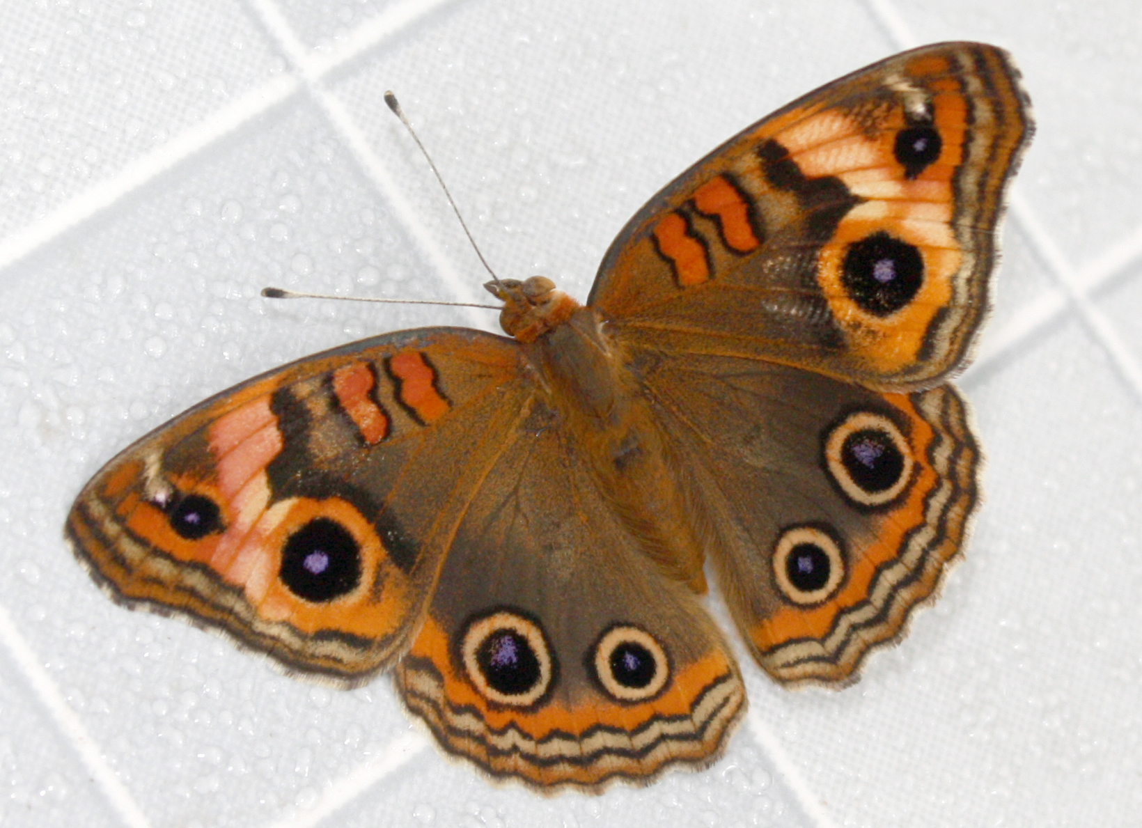 Caribbean Buckeye (Junonia evarete) in Coulibistrie, Dominica.